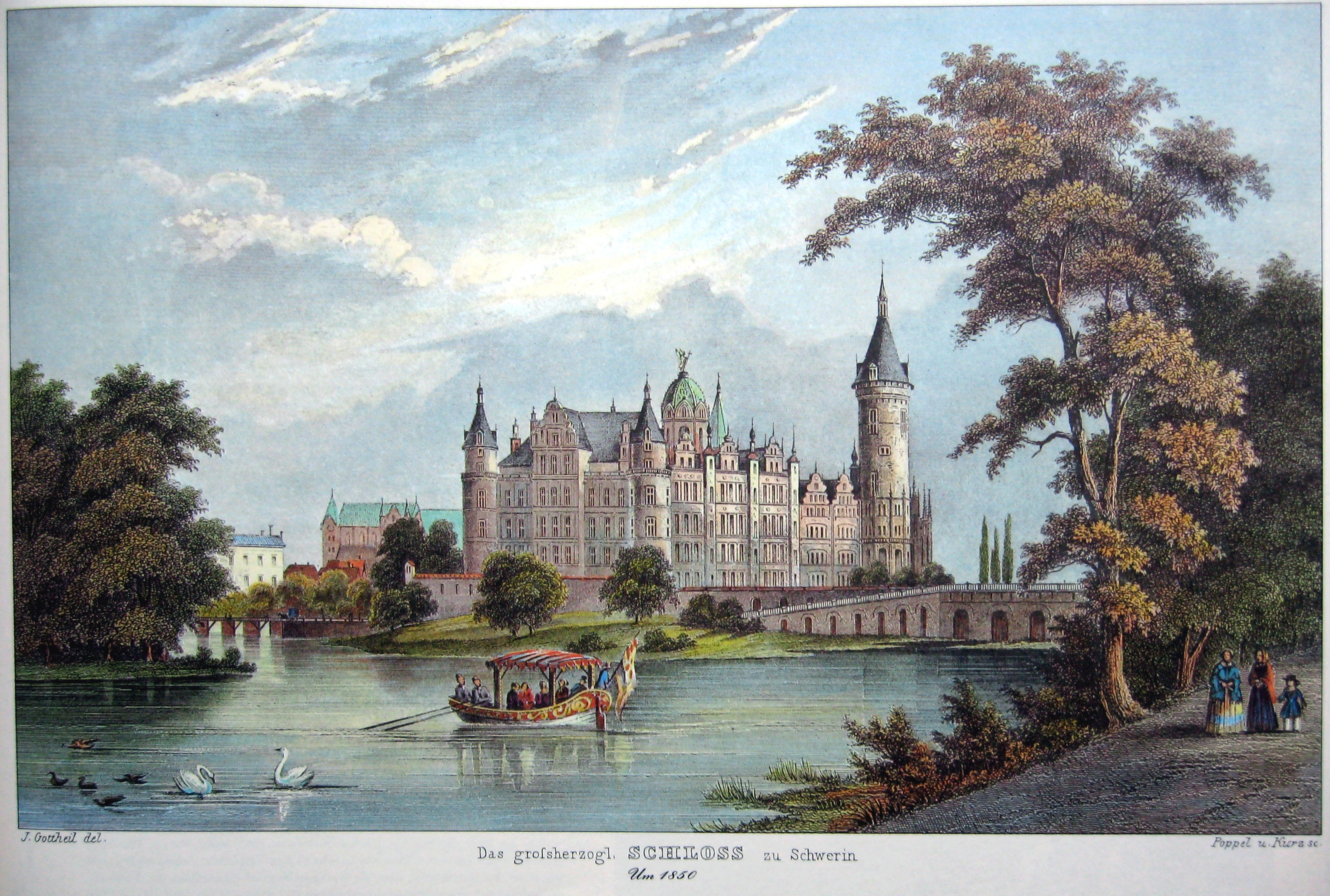 Das Großherzogliche Schloss zu Schwerin. Stahlstich um 1850.